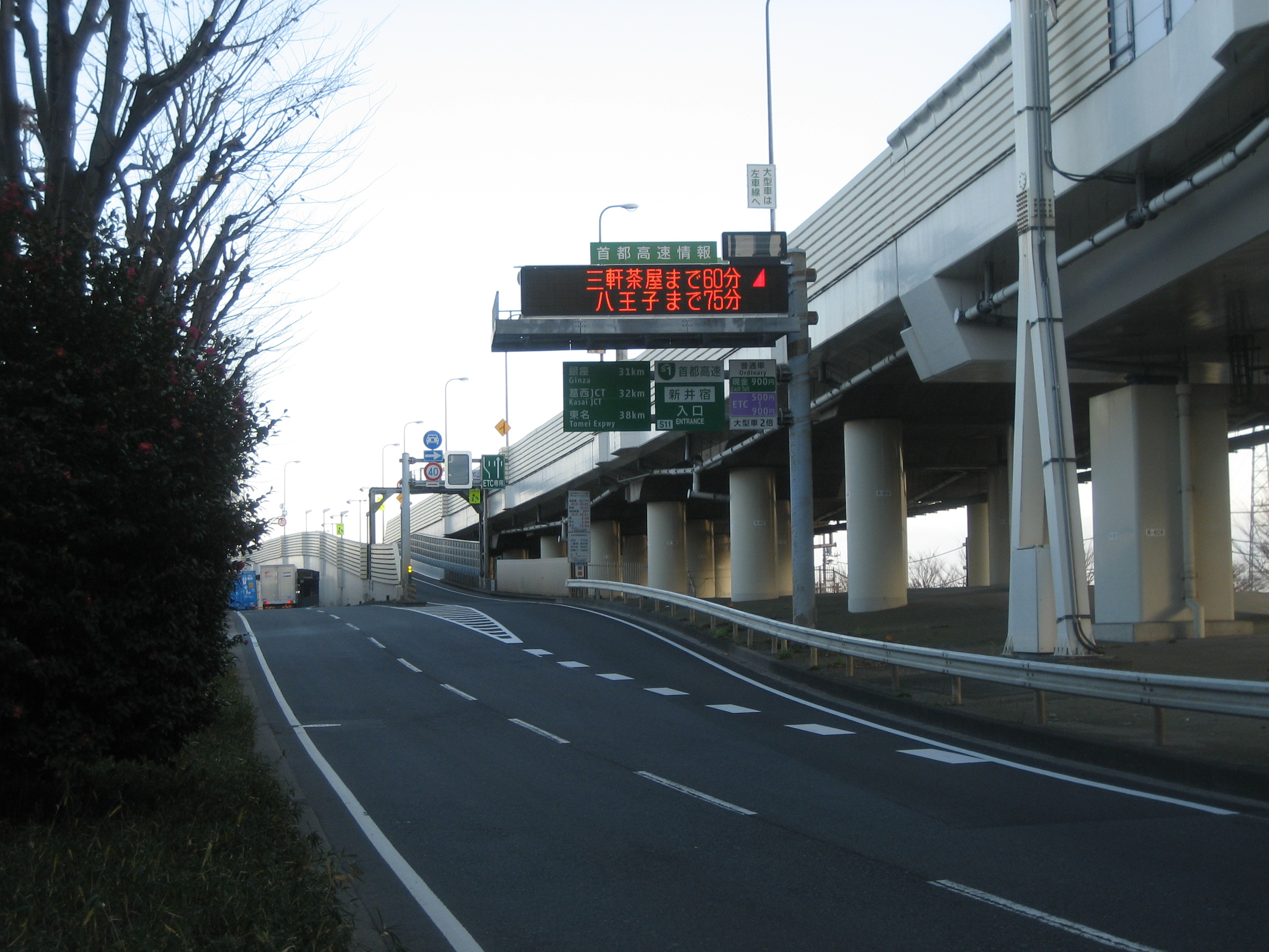 首都高速川口線新井宿入口（一般道から撮影）